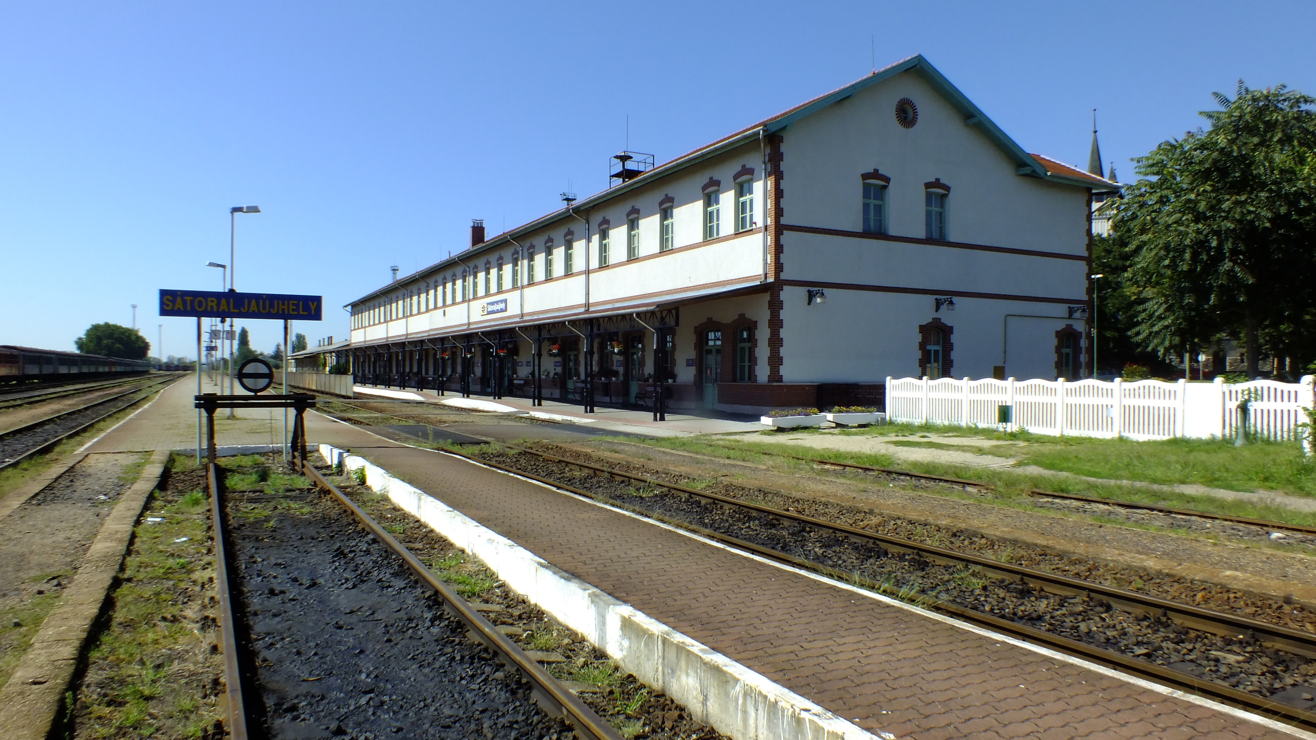 Sátoraljaújhely staniční budova